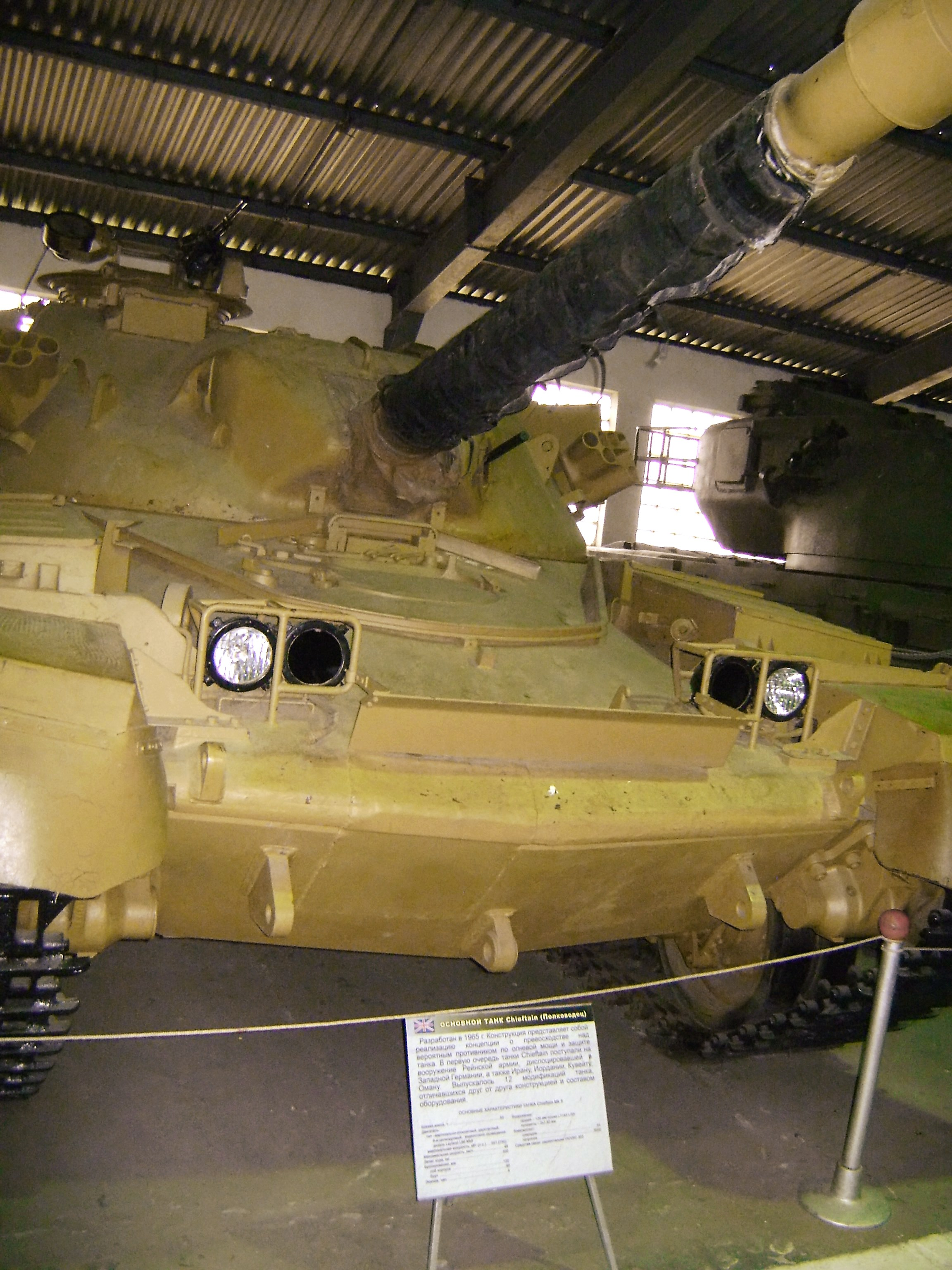 Tank Museum, Kubinka. Ex-Iranian Chieftain Mk.5 tank.